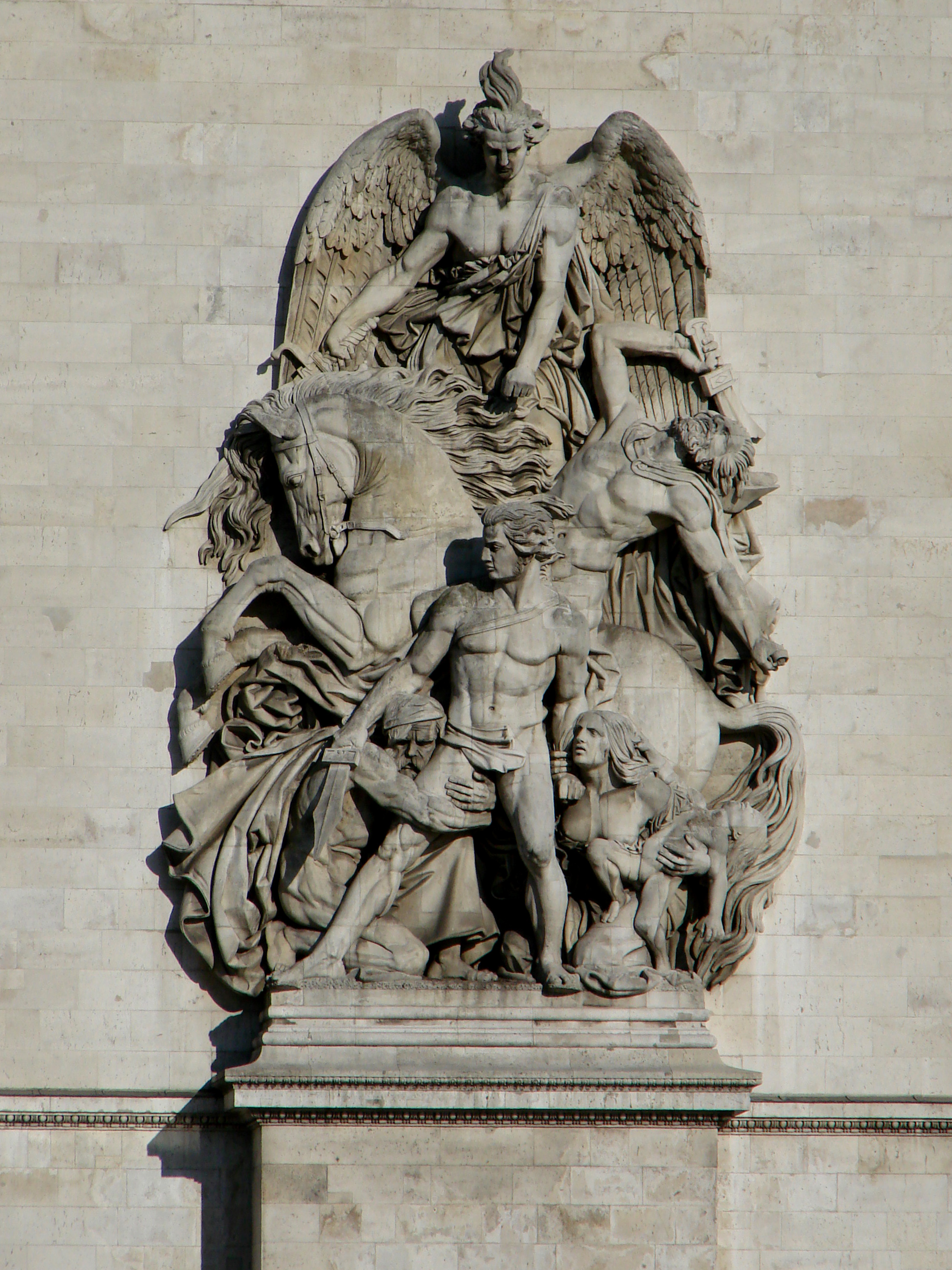 L'Arc de Triomphe à Paris, vu depuis l'Avenue de la Grande-Armée: la Résistance, par Antoine Etex (bas-relief de droite).